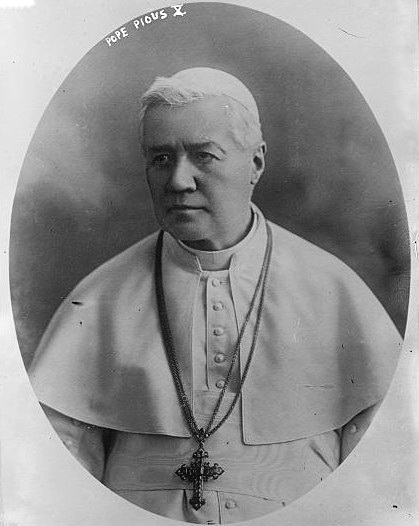 Pope Pius X